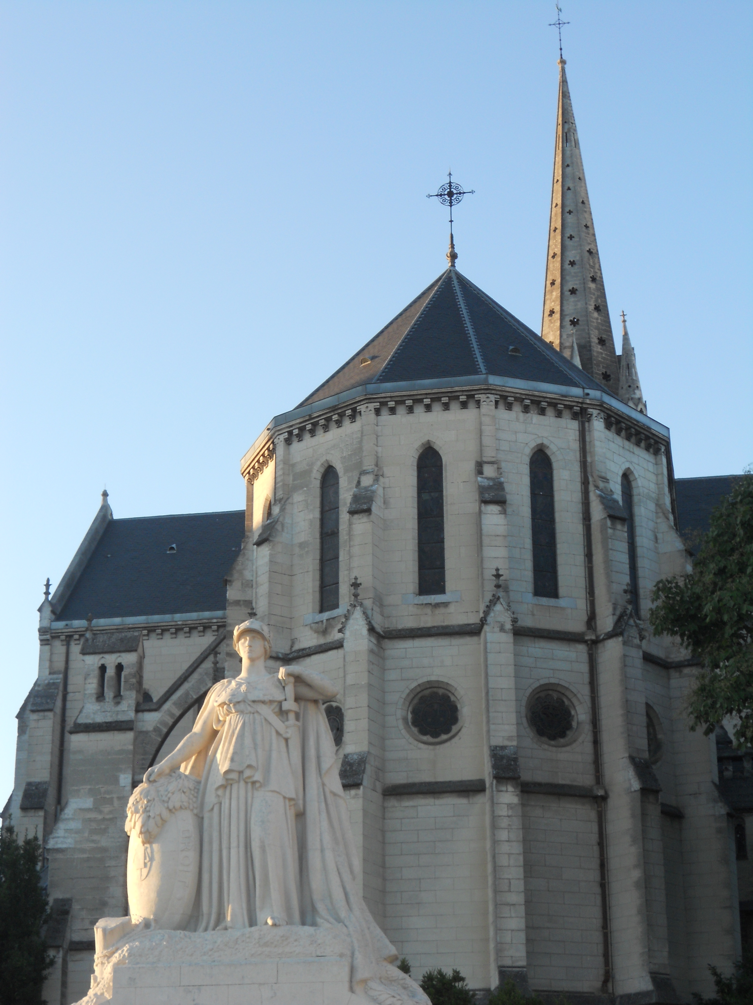 Eglise Saint Martin de Pau et Monument aux Morts